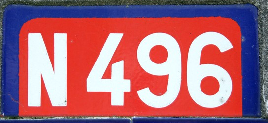 Cartouche de la route nationale 496